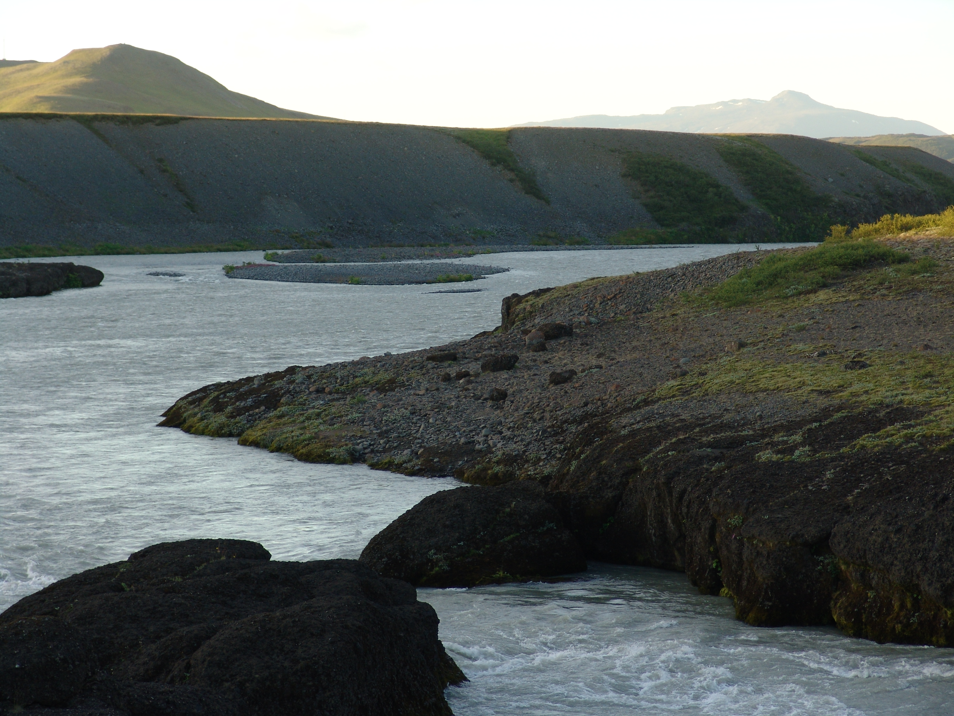 Landschaft.